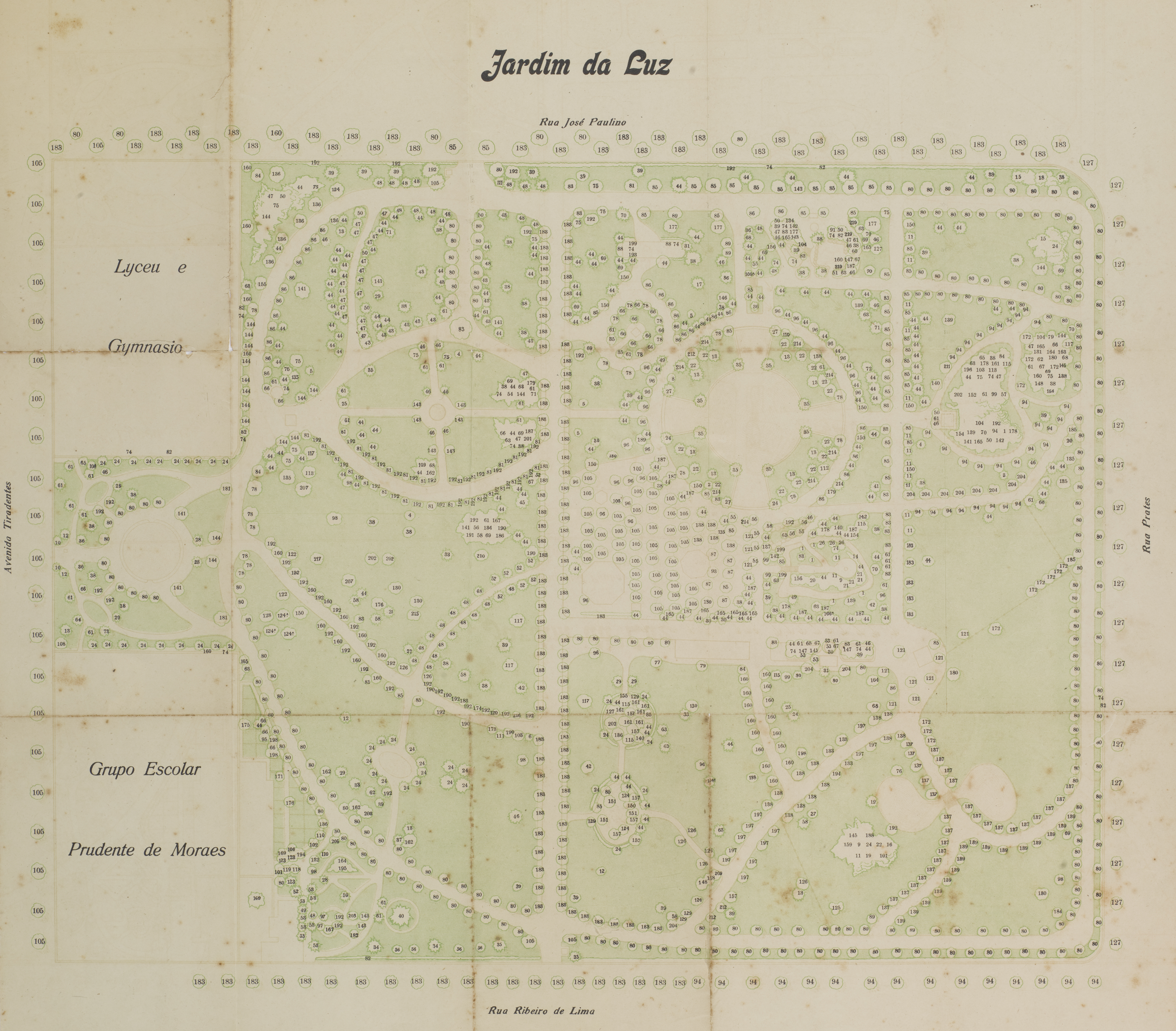 Obra que integra o acervo do Museu Paulista da USP. Coleção João Baptista de Campos Aguirra